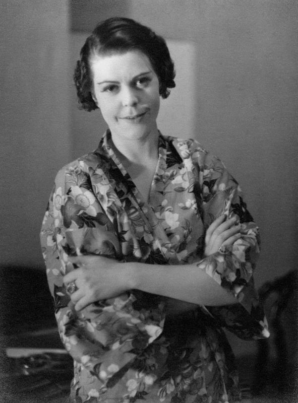 Sonja Sjöstrand i Villa Guldregn på Helsingborgs stadsteater.